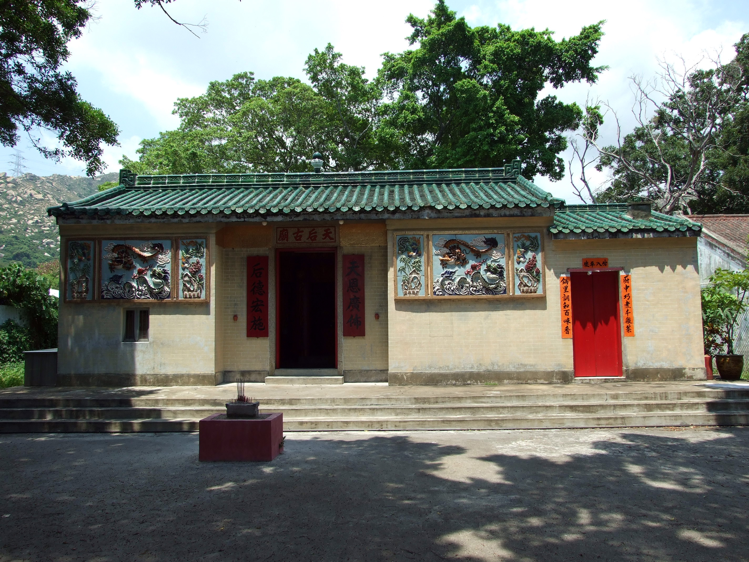 中文（香港）: 龍鼓灘天后古廟